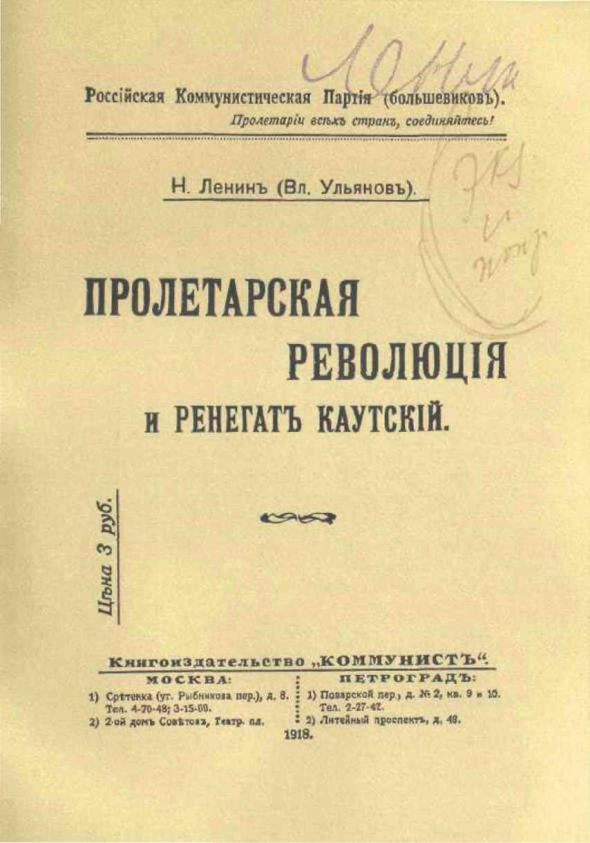 Ленин - Пролетарская революция и ренегат Каутский (1918)